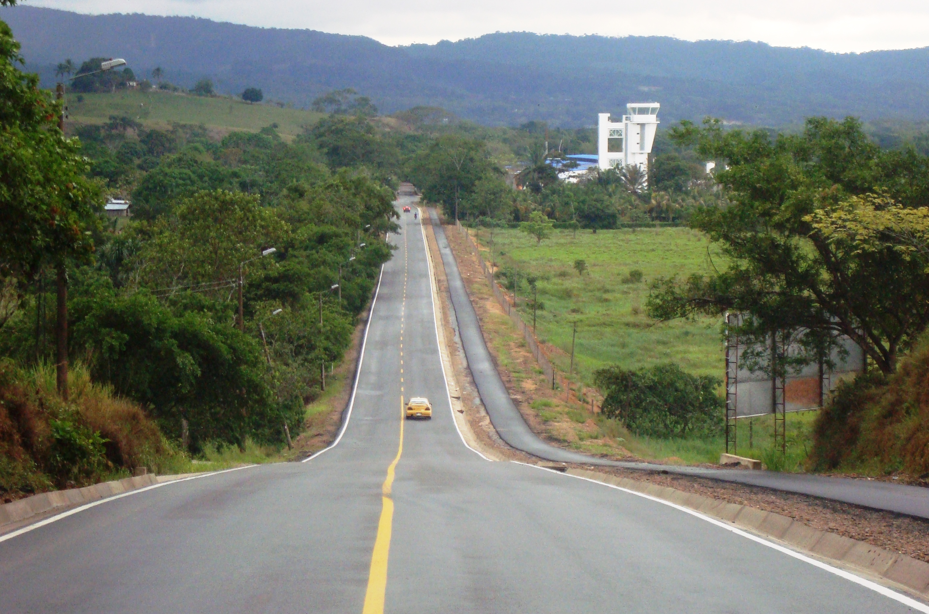 Carretera Marginal de la Selva (Carretera Nacional 65) en el tramo que de Florencia (Caquetá) conduce al Aeropuerto Gustavo Artunduaga.